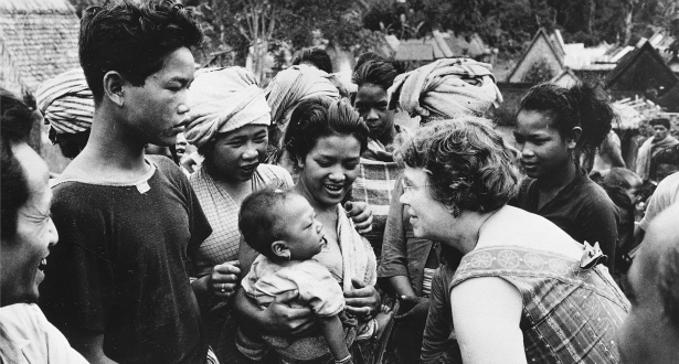 Margaret Mead Välitööl Samoal